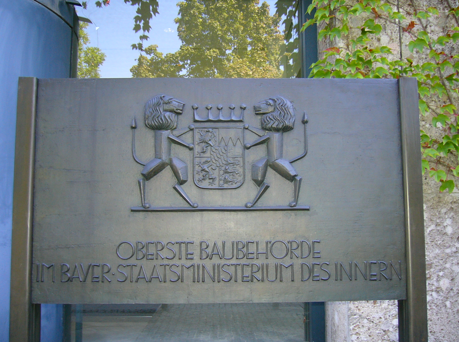 Oberste Baubehörde im Bayerischen Staatsministerium des Innern (München) - Schild